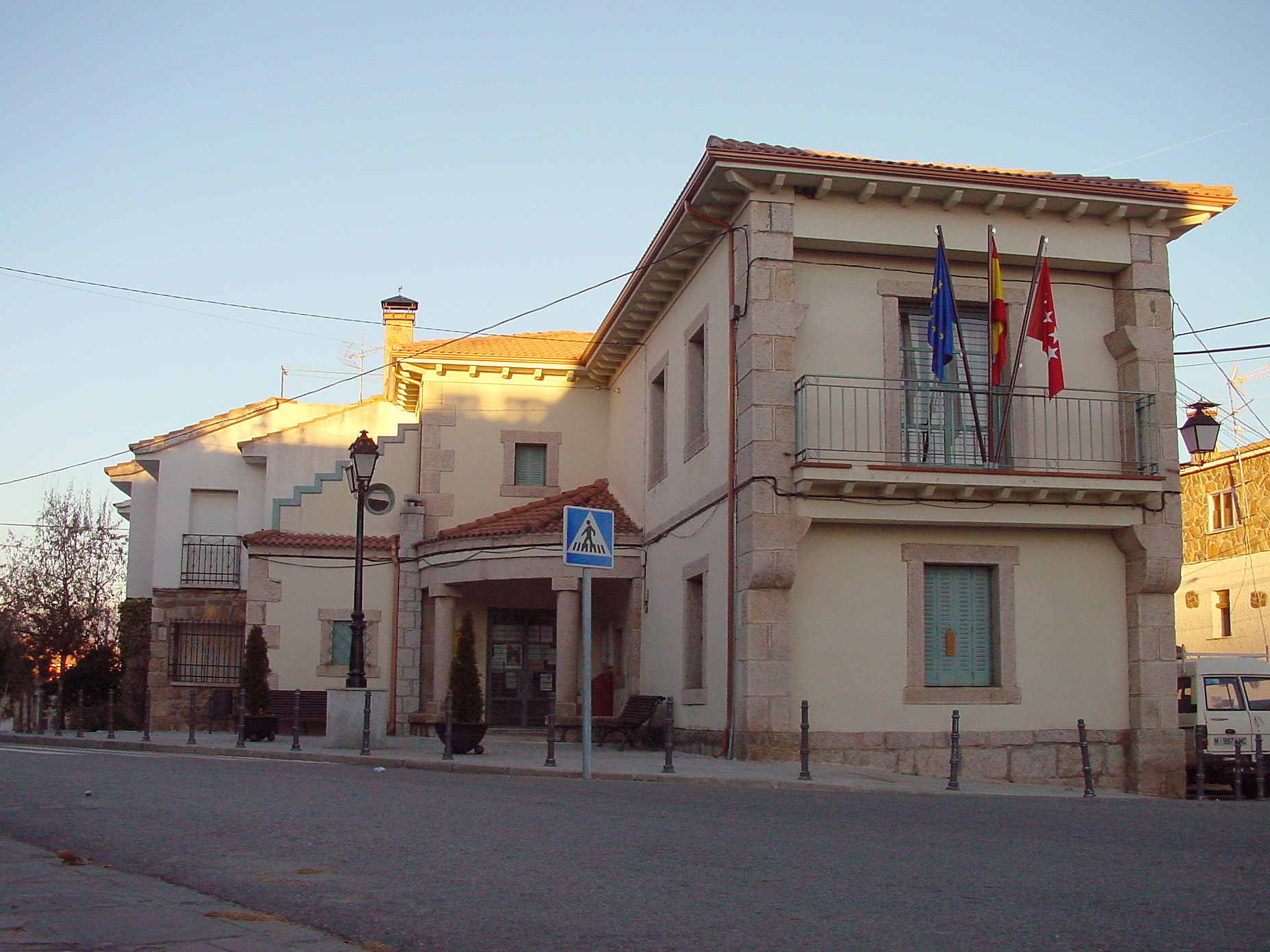 Ayuntamiento de Gascones.